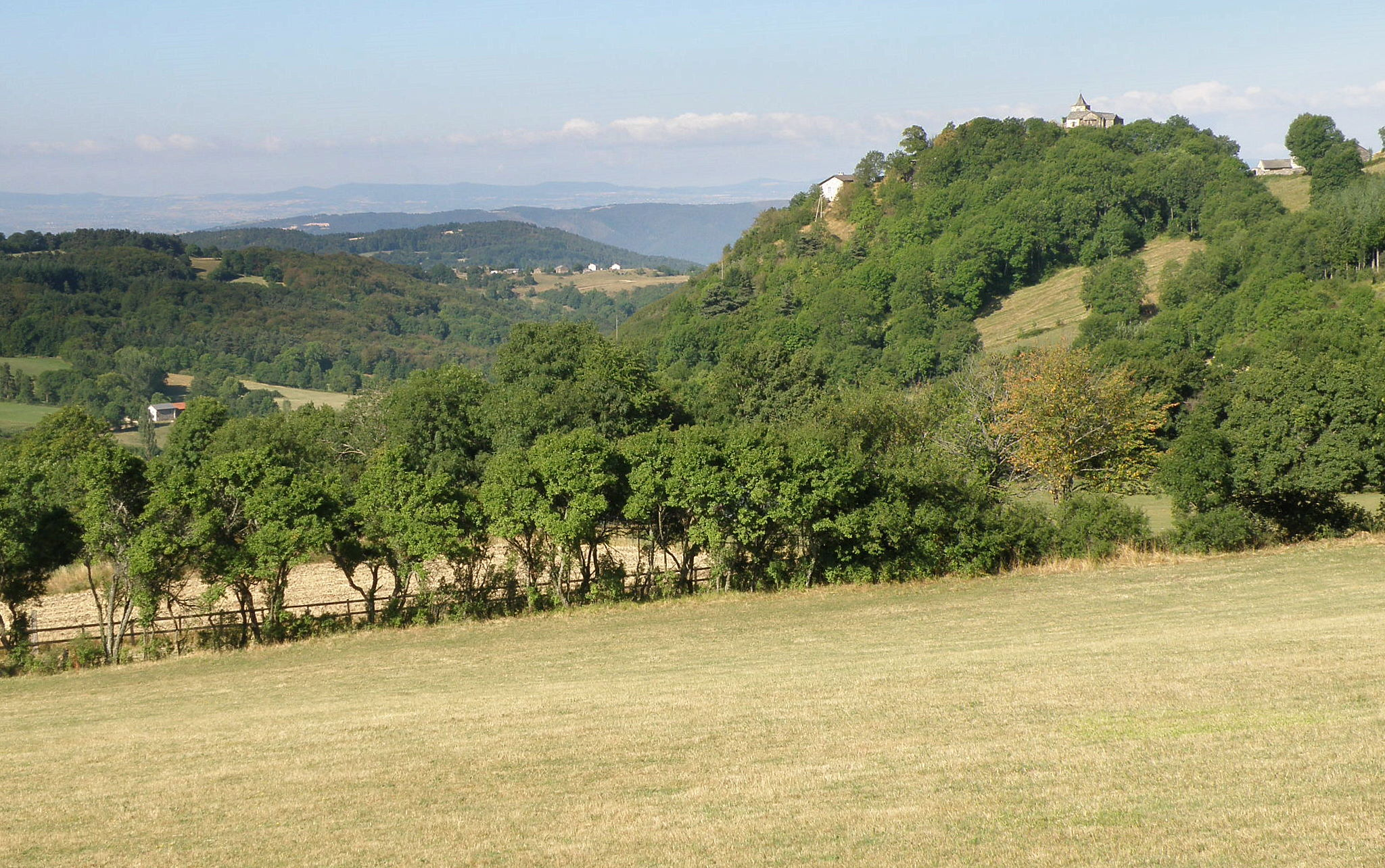 Commune de Saint-Julien-du-Pinet, dép. de la Haute-Loire, France (région Auvergne). Chapelle de Glavenas (à droite), sur son piton rocheux, à 979m d'altitude, vue depuis la D28. Coup d'oeil vers l'ouest.